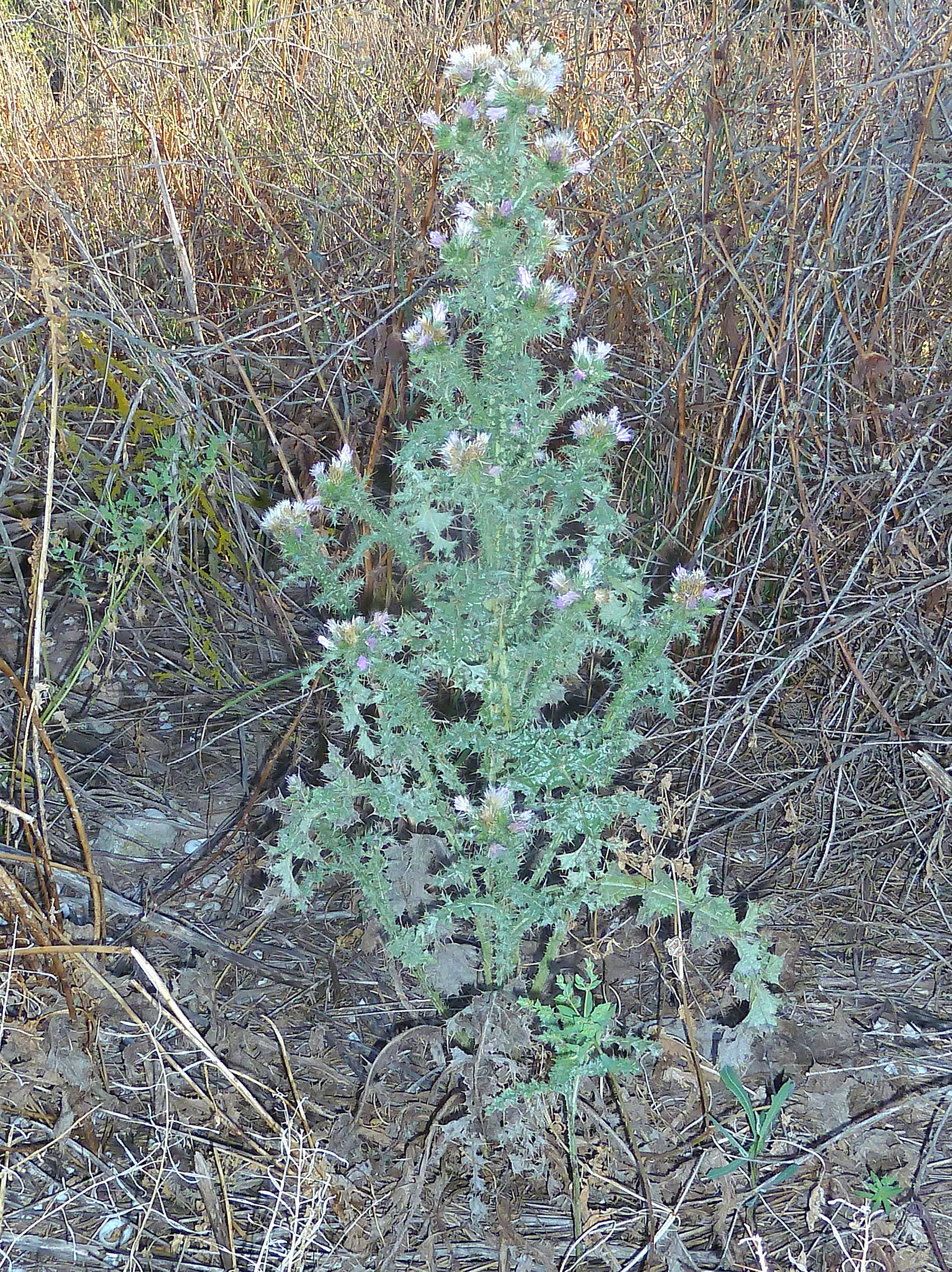 Carduus tenuiflorus (cardo borriquero, cardo de la alegría, ...) : vista general - El Tollo, Albatera (Alicante, España).